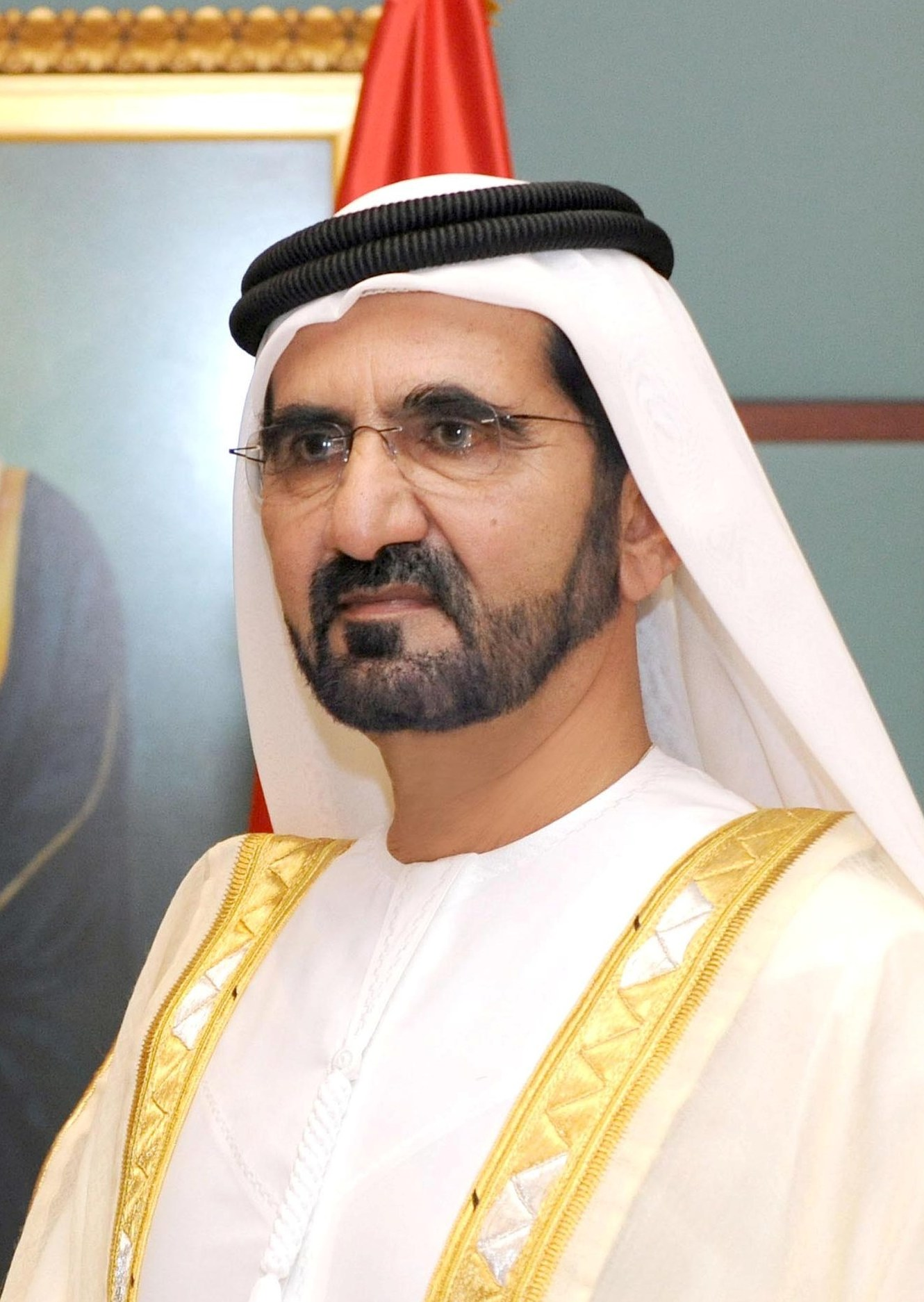 Встреча Президента России Владимира Путина с Королём Саудовской Аравии Сальманом Бен Абдель Азизом Аль Саудом